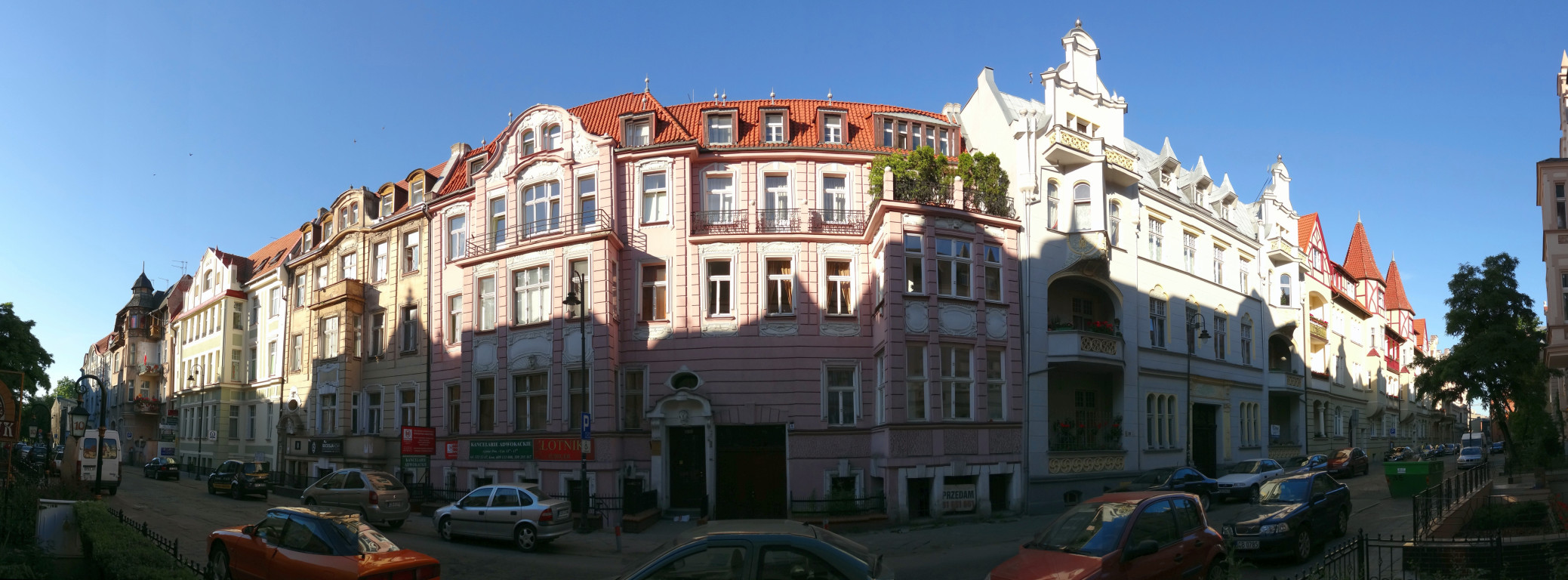 Ulica Augusta Cieszkowskiego w Bydgoszczy